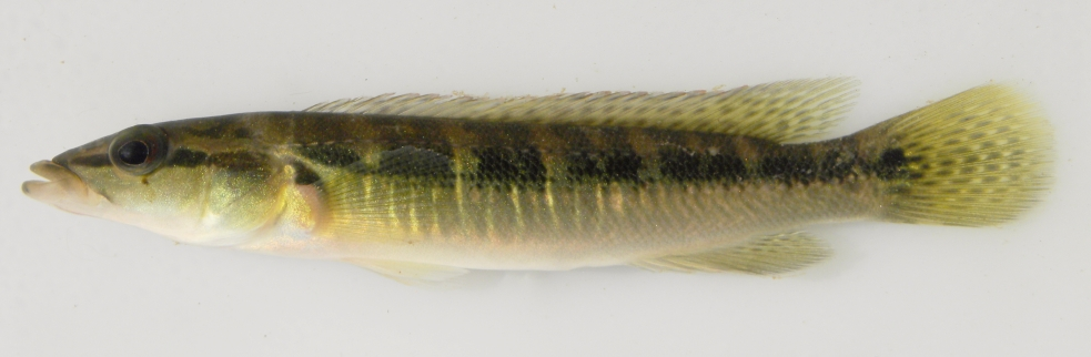 Ejemplar macho de C. missioneira de Uruguay